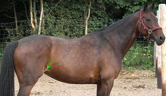 Kniefalte